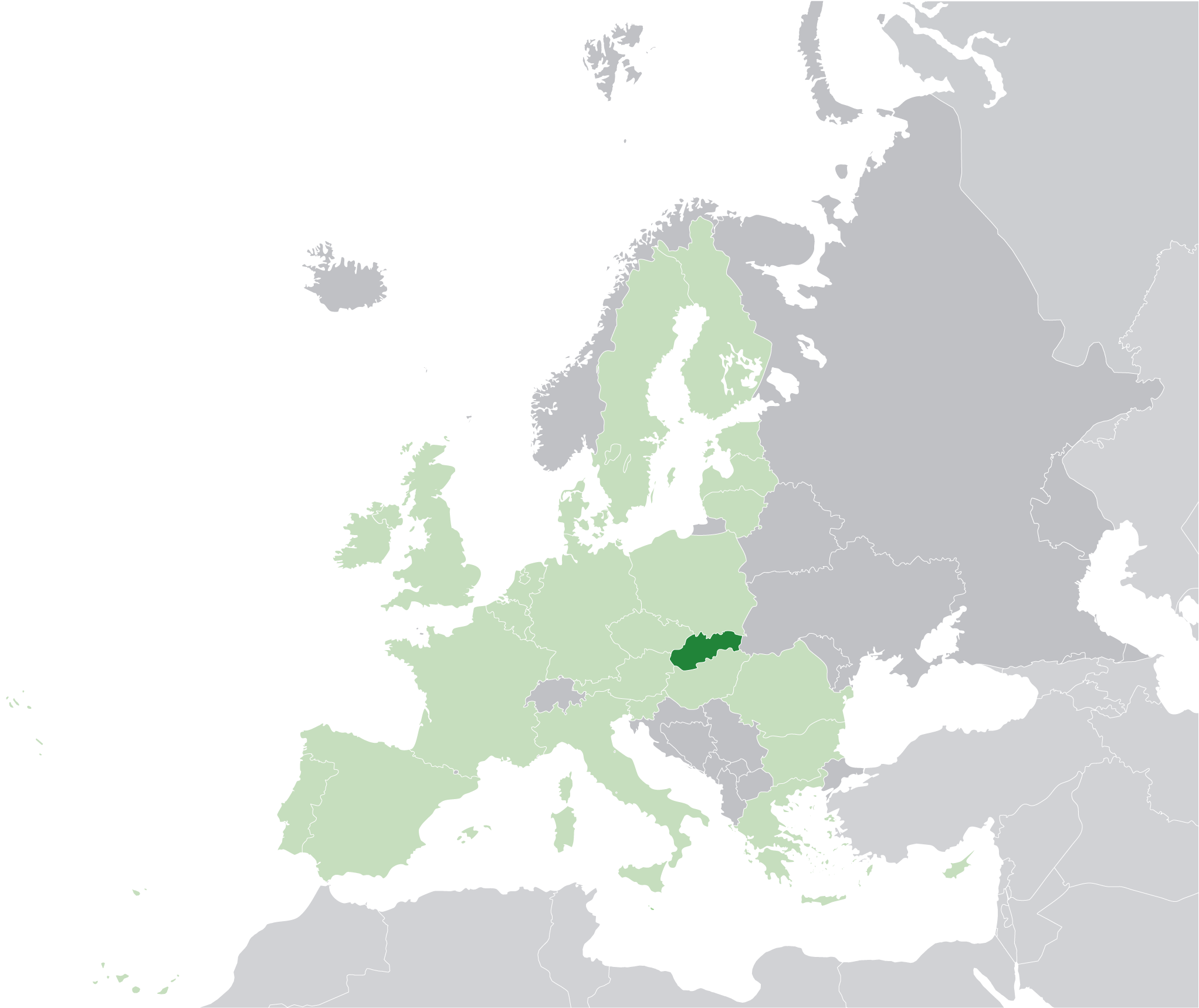 Slovākijas atrašanās vieta Eiropā.